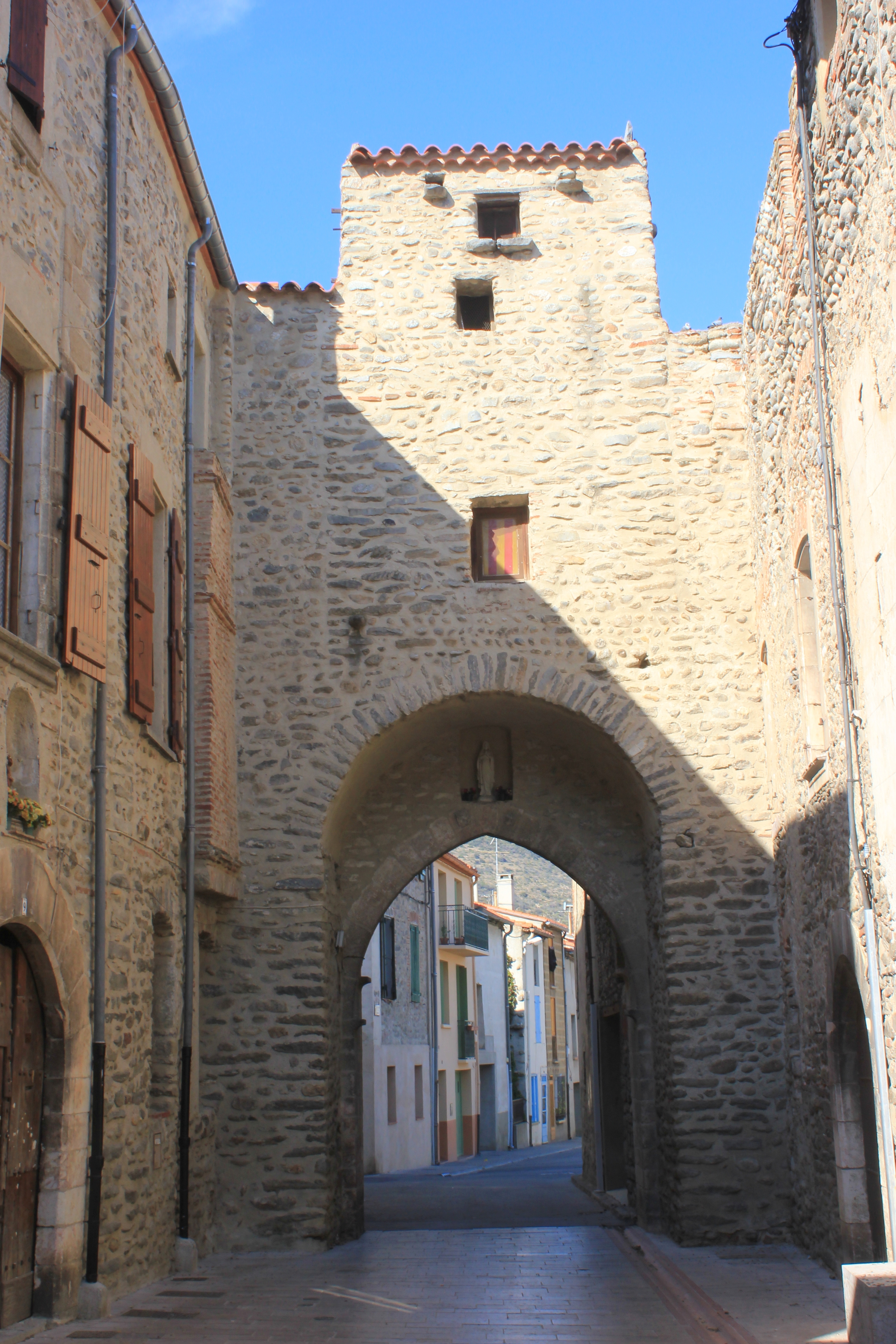 Vinça (66320 France) ruelle